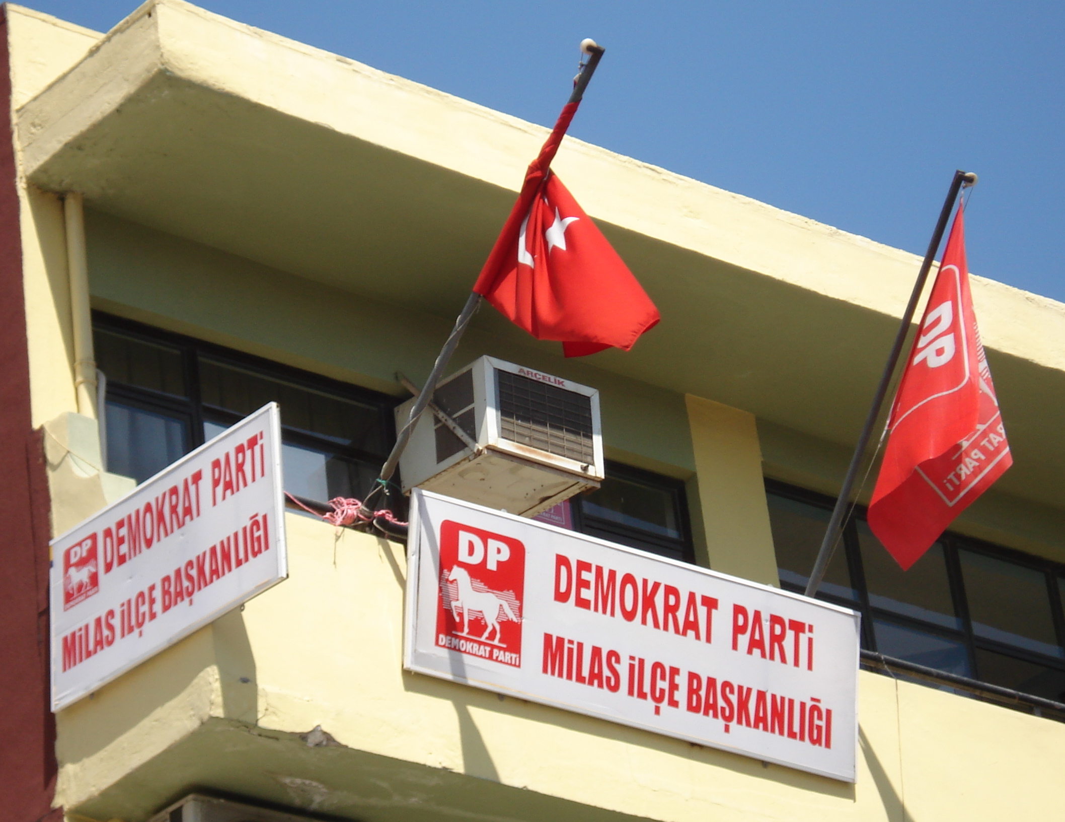 Milas, Muğla